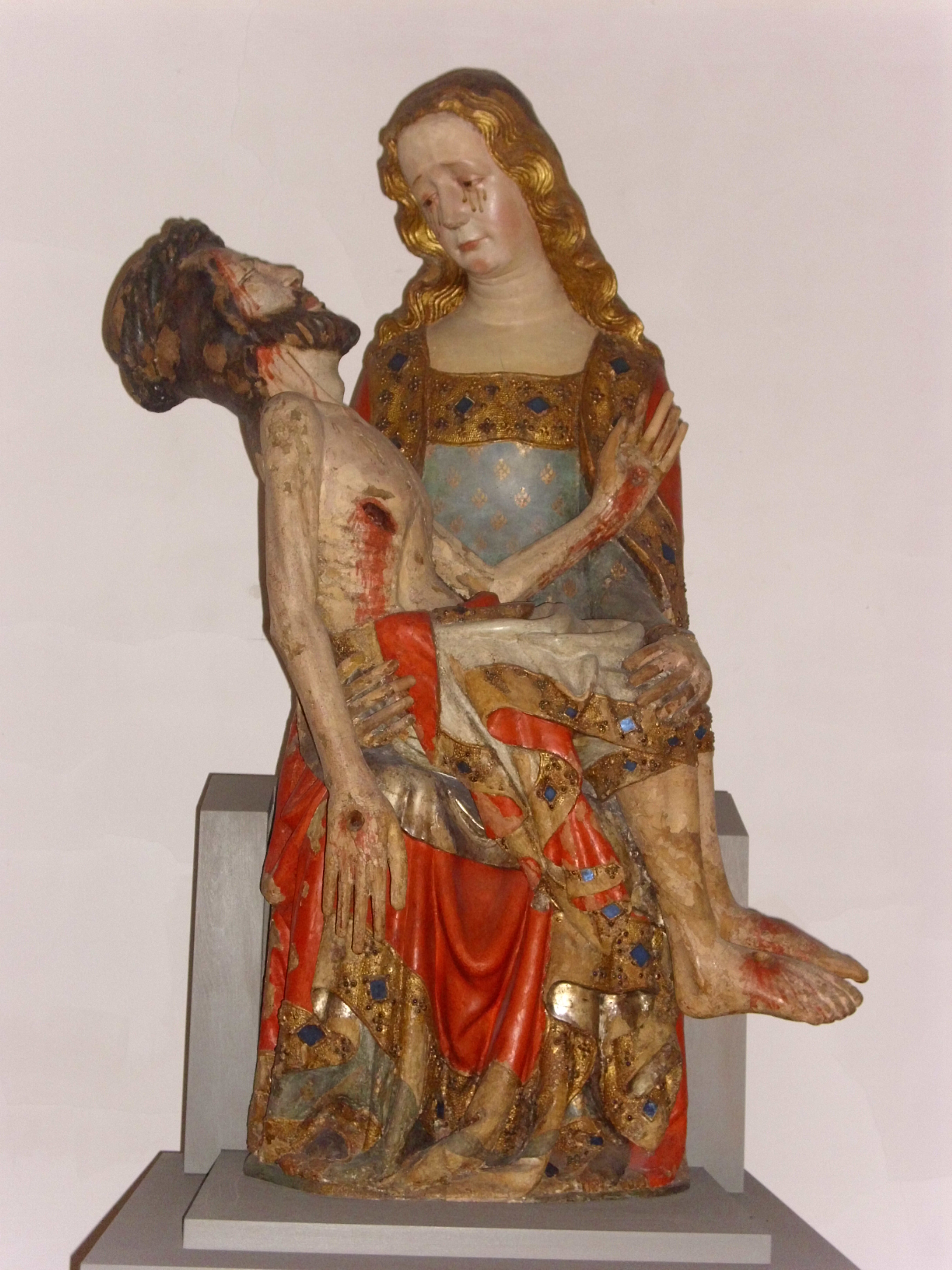 Pietà, Holzskulptur, 14. Jh., St. Andreas, Köln, Nord-Querschiff